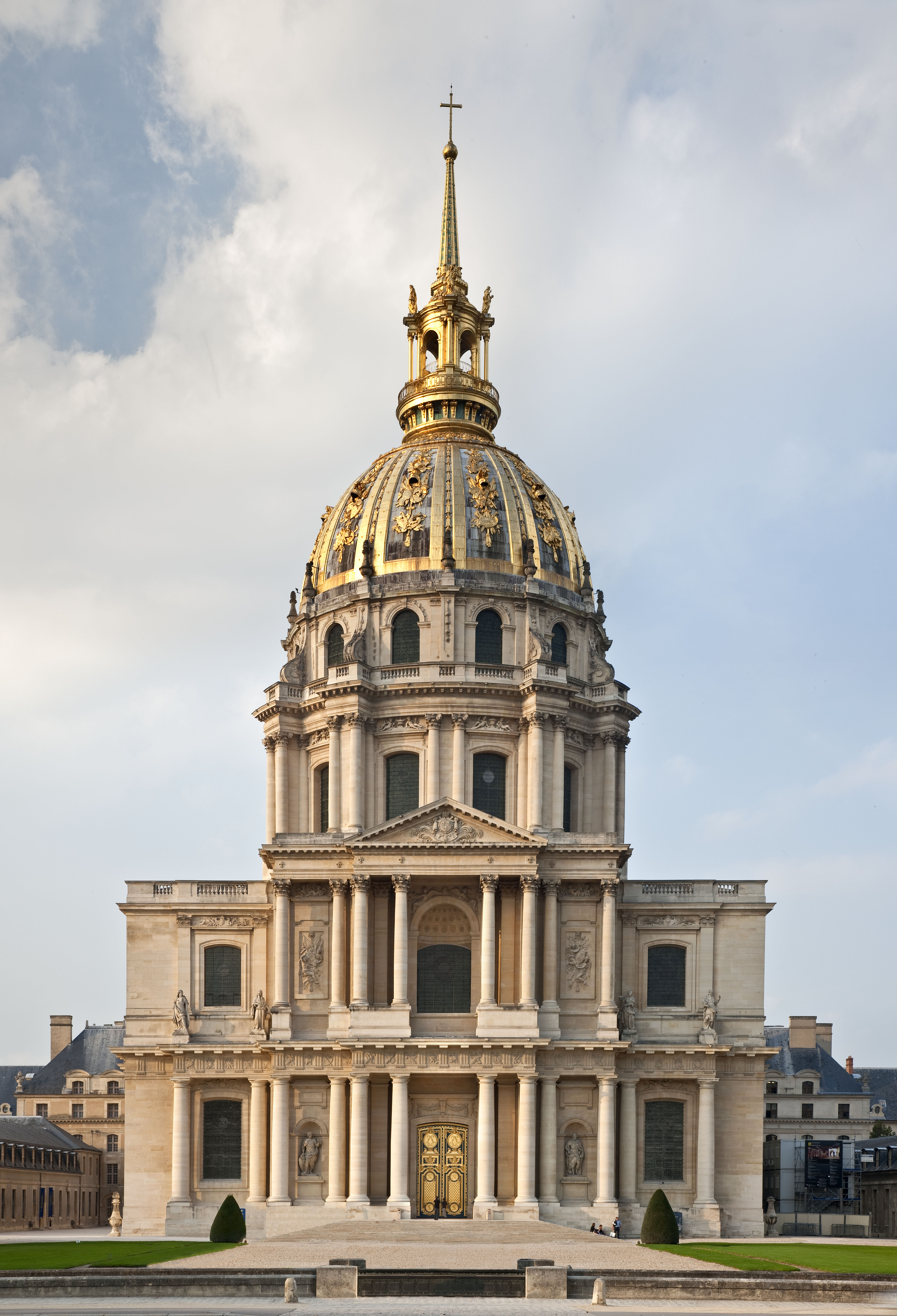 L'Eglise du Dôme, Paris, musée de l'Armée